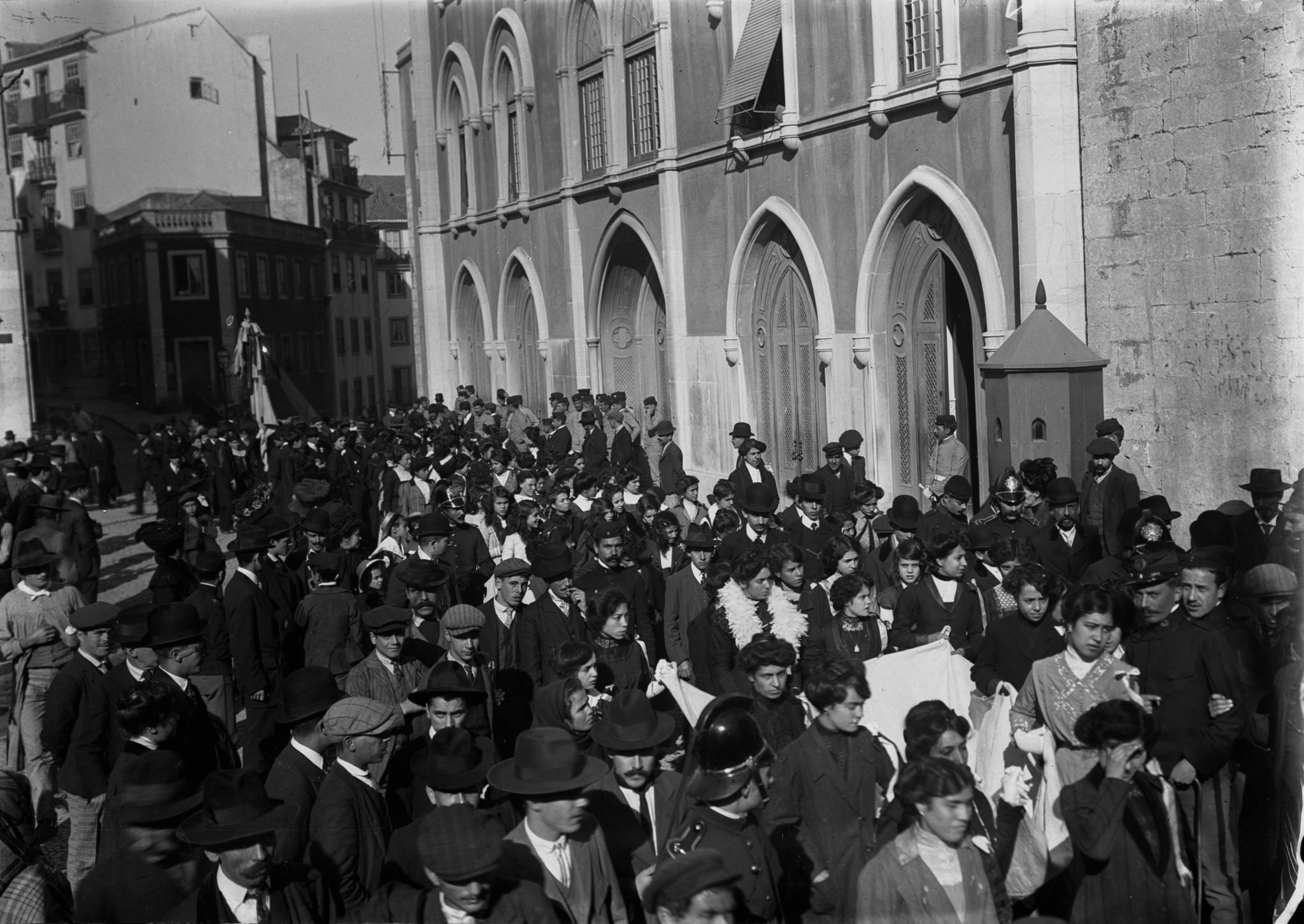 Título: Bando precatório a favor das vítimas da revolução republicana junto do quartel do Carmo Dimensão: 9 x 12 cm Suporte: Negativo de gelatina e prata em vidro Notas: Inscrição no original: 7738 Assunto: Guarita / Revolução de 5 de Outubro, 1910 (Portugal) / Peditório / Quartel / Carmo (largo, Santa Maria Maior, Lisboa, Portugal) Código de referência: PT/AMLSB/JBN/001471